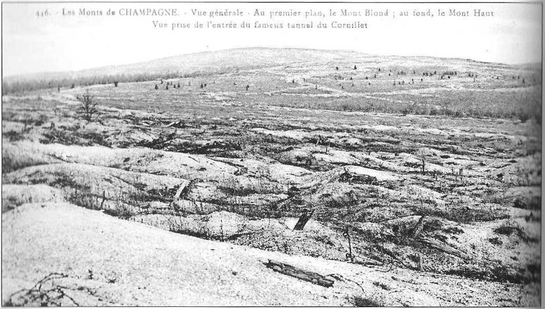 Carte postale ancienne des Monts de Champagne . Mont de Champagne entrée du tunnel de Cornillet .